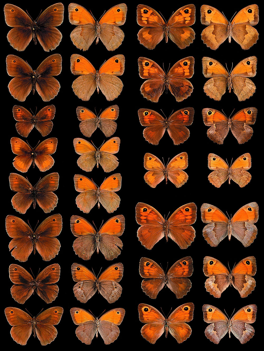 Maniola species. 1. M. jurtina France (male), 2. M. jurtina France (female), 3. M. jurtina Sardinia (male), 4. M. jurtina Sardinia (female), 5. M. telmessia (male), 6. M. telmessia (female), 7. M. nurag (male), 8. M. nurag intermediate form (male), 9. M. nurag (female), 10. M. chia (male), 11. M. chia (female), 12. M. halicarnassus (male), 13. M. halicarnassus (female), 14. M. cypricola (male), and 15. M. cypricola (female).